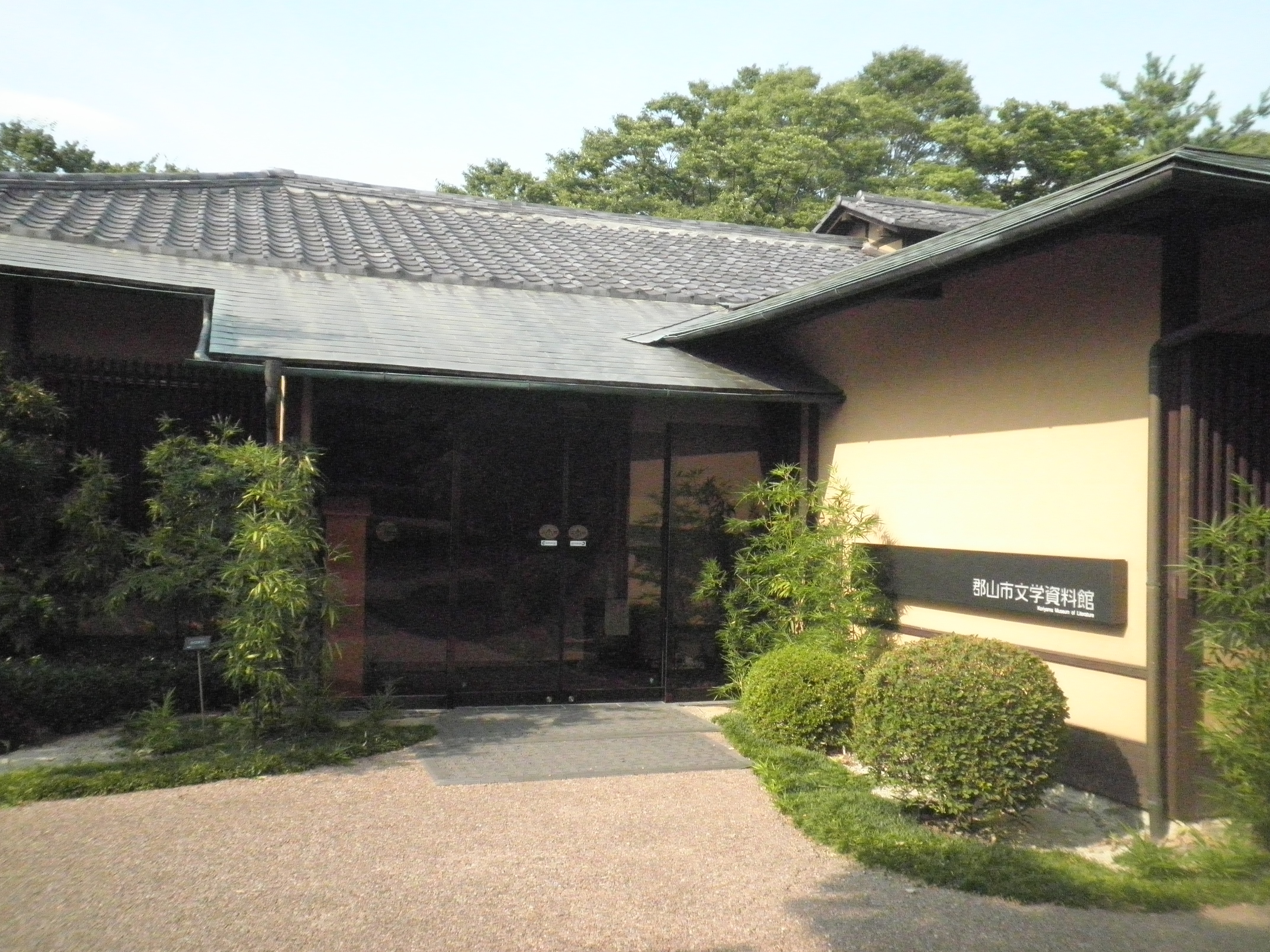 郡山市にある郡山市文学資料館